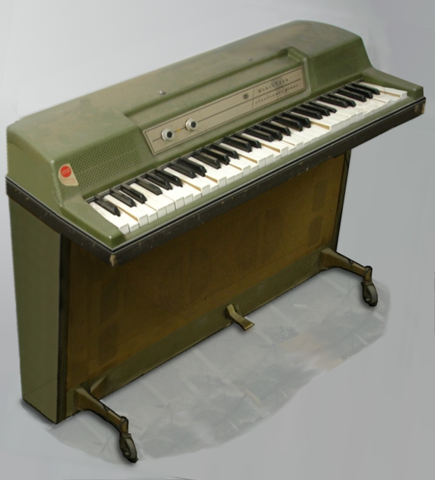 Wurlitzer 206A ... or 214V or 203W